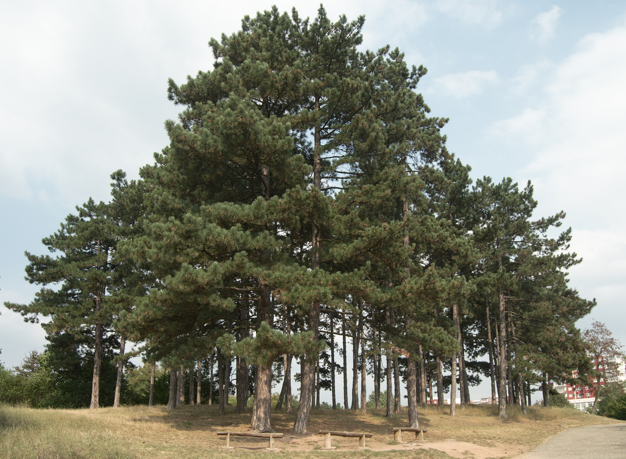 Brno-Vinohrady - skupina borovic na okraji Akátek na parcele 7975/1 v k.ú. Židenice